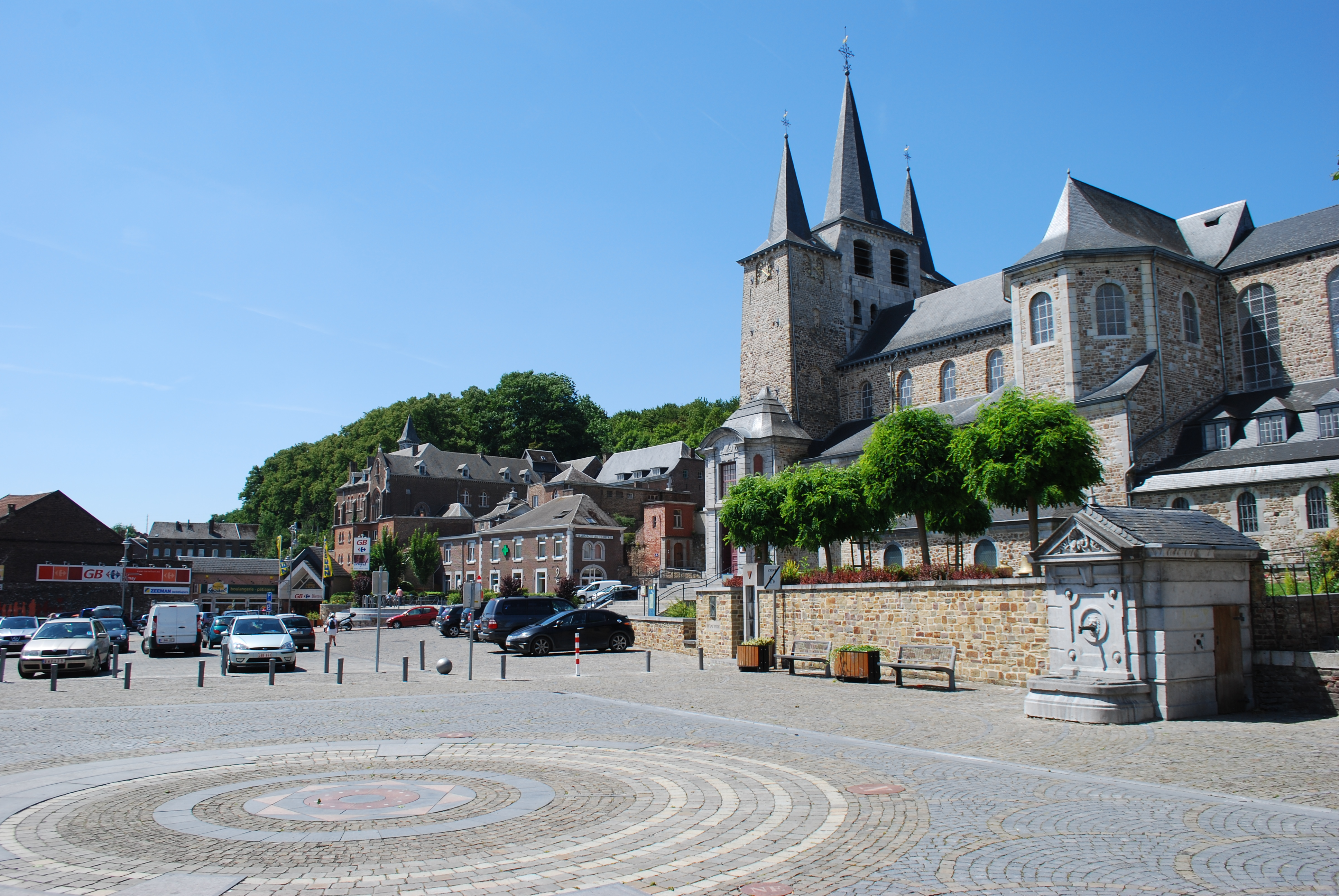 Vue de la place Sainte-Ode à Amay.